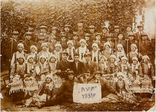 У 1933 році у Зубкові при "Читальні" було створено товариство «Луг».